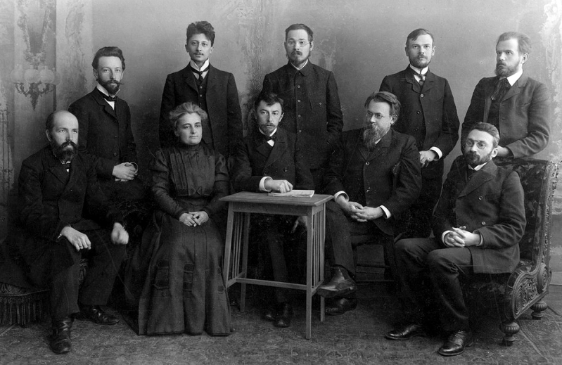 Минералогический кружок Московского университета: сидят: Цебриков В.М., Ревуцкая Е.Д., Попов С.П., Вернадский В.И., Самойлов Я.В. стоят: Карандеев В.В., Сургунов Н.И., Аршинов В.В., Боголюбов Н.Н., Касперович Г.И.